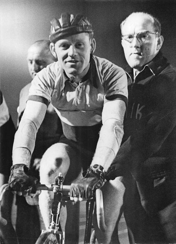 Leipzig, Turn- und Sporttreffen, Radrennen Zentralbild Dittrich-Schlegel-Wlocka 21.7.1957 Turn- und Sporttreffen der Jugend in Leipzig. Im Rahmen des Turn- und Sporttreffens der Jugend fanden am 20.7.1957 abends die Massenübungen der Kinder, Sportlerinnen und Sportler des Bezirkes Leipzig, Sportvereinigung Dynamo und Sportvereinigung Vorwärts statt. Daran schloß sich das Aschenbahnrennen mit unseren Radsportlern an. Am Start befand sich u.a. auch die siegreiche Mannschaft der X. Internationalen Radfernfahrt für den Frieden "Prag-Berlin-Warschau". UBz: Täve Schur mit seinem Trainer Herbert Weisbrodt am Start zum Vierer-Mannschafts-Verfolgungsfahren. (Wlocka)